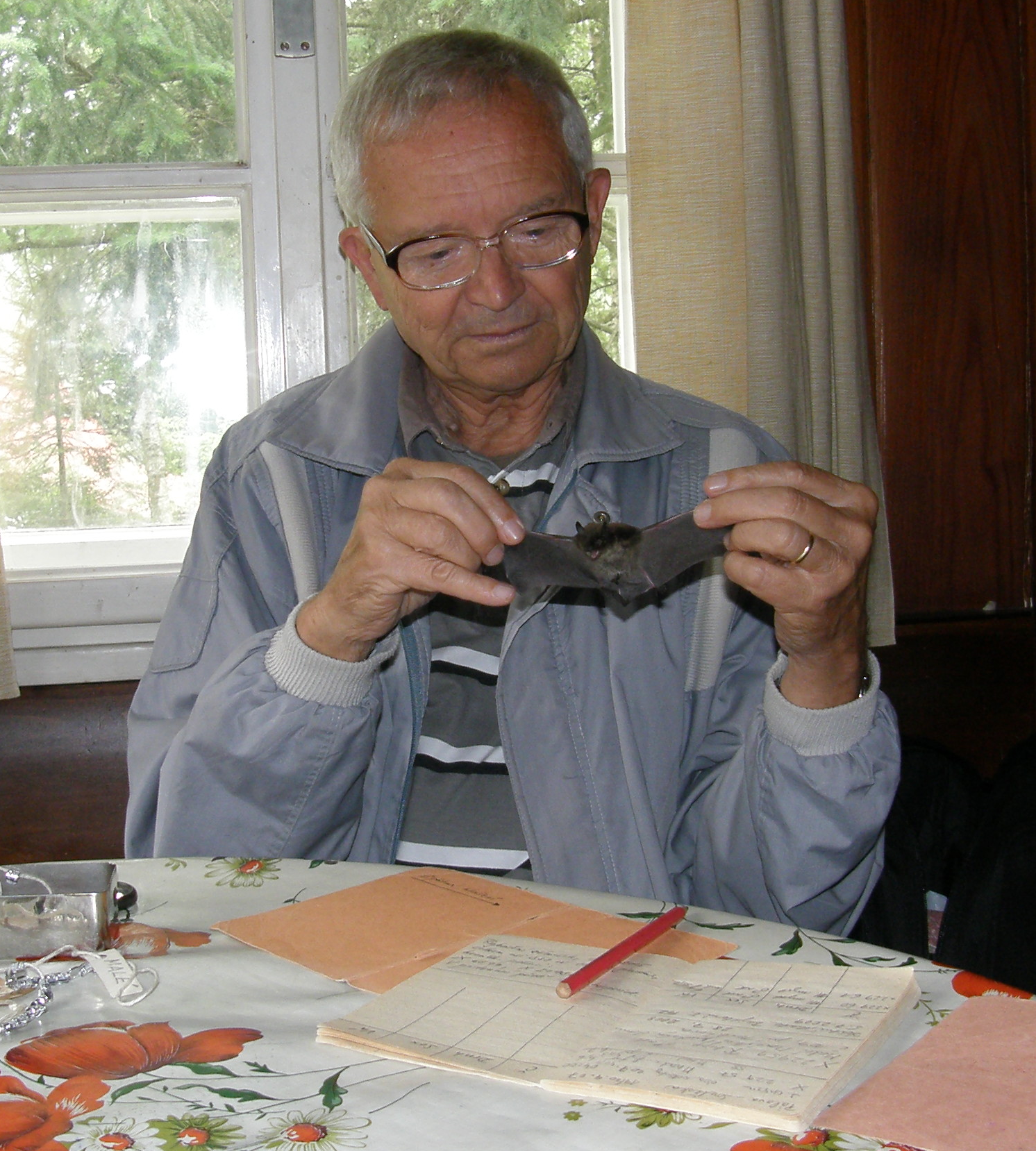 prof. Jiří Gaisler